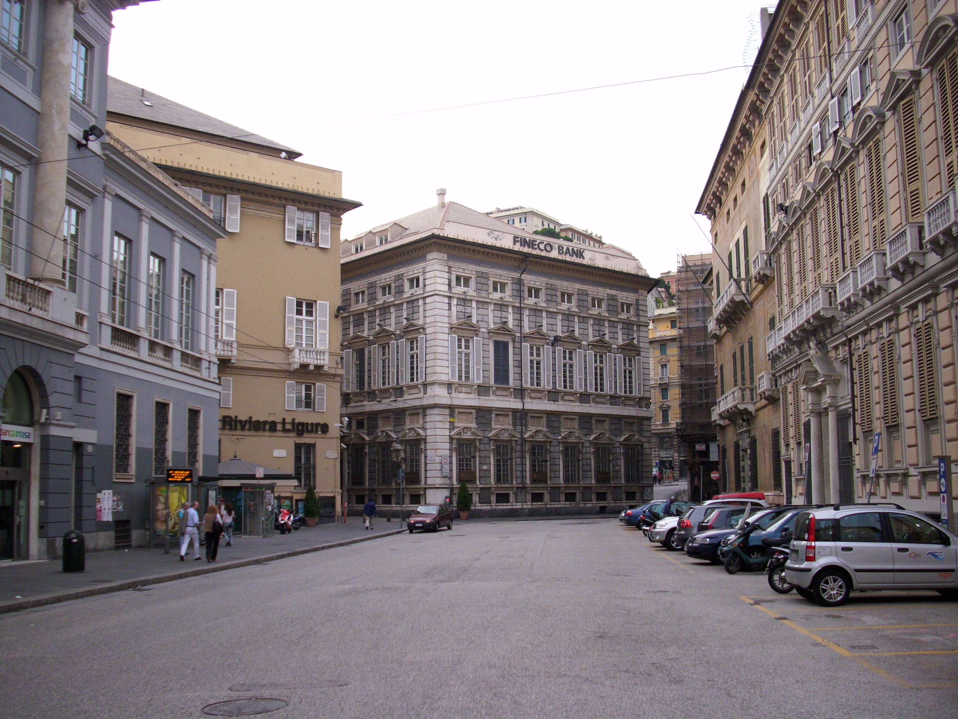 Piazza Fontane Marose a Genova. In fondo alla piazza vi e' Palazzo Pallavicini-Cambiaso, il prima a sinistra è palazzo Spinola di Luccoli-Balestrino, mentre sulla destra di può notare la facciata di palazzo Negrone.